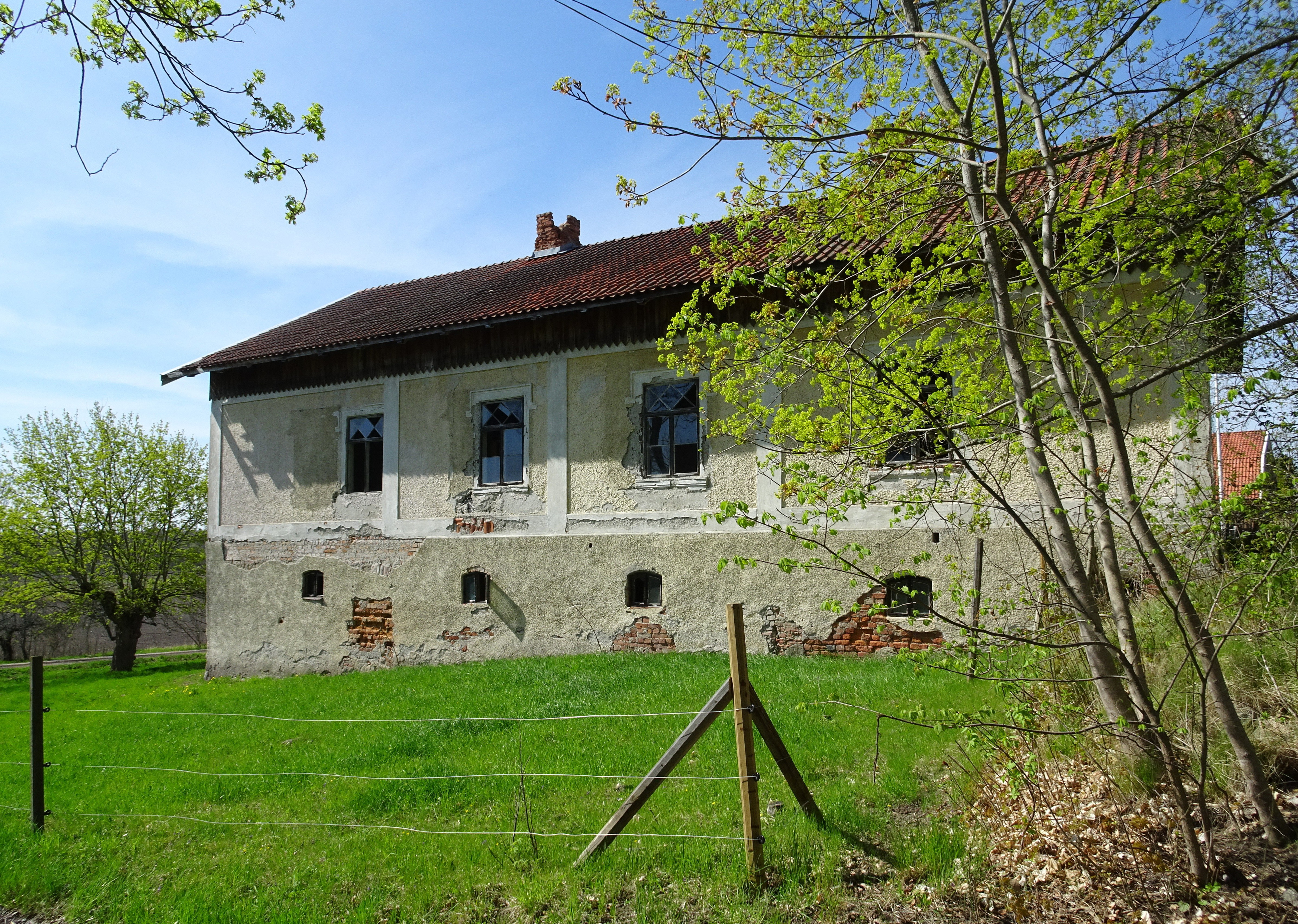 Lagnö gård, huvudbyggnad